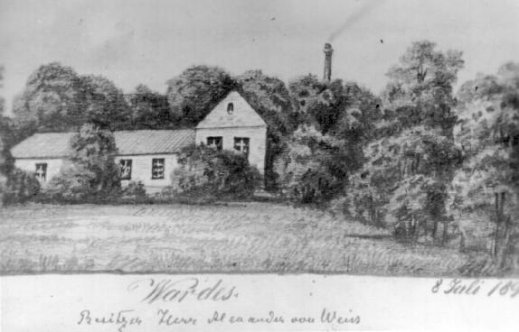 Varudi mõis